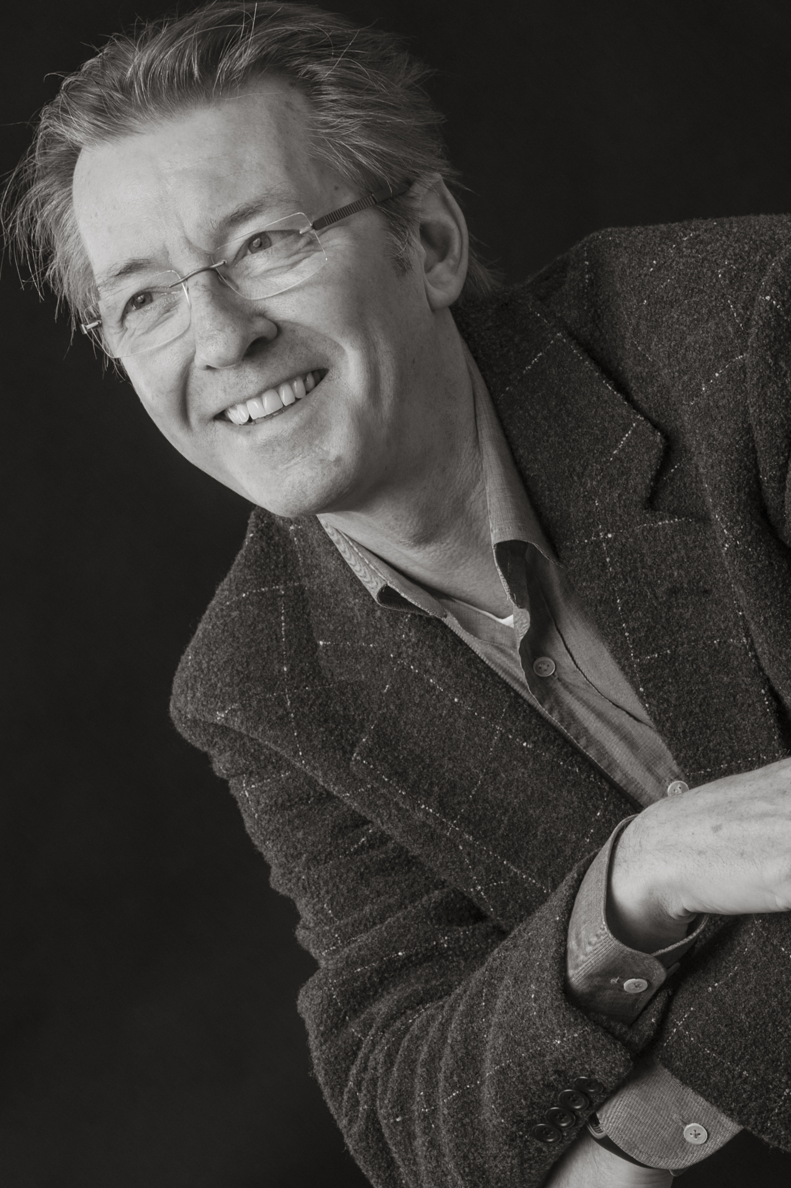 Gijs Wanders - 2013